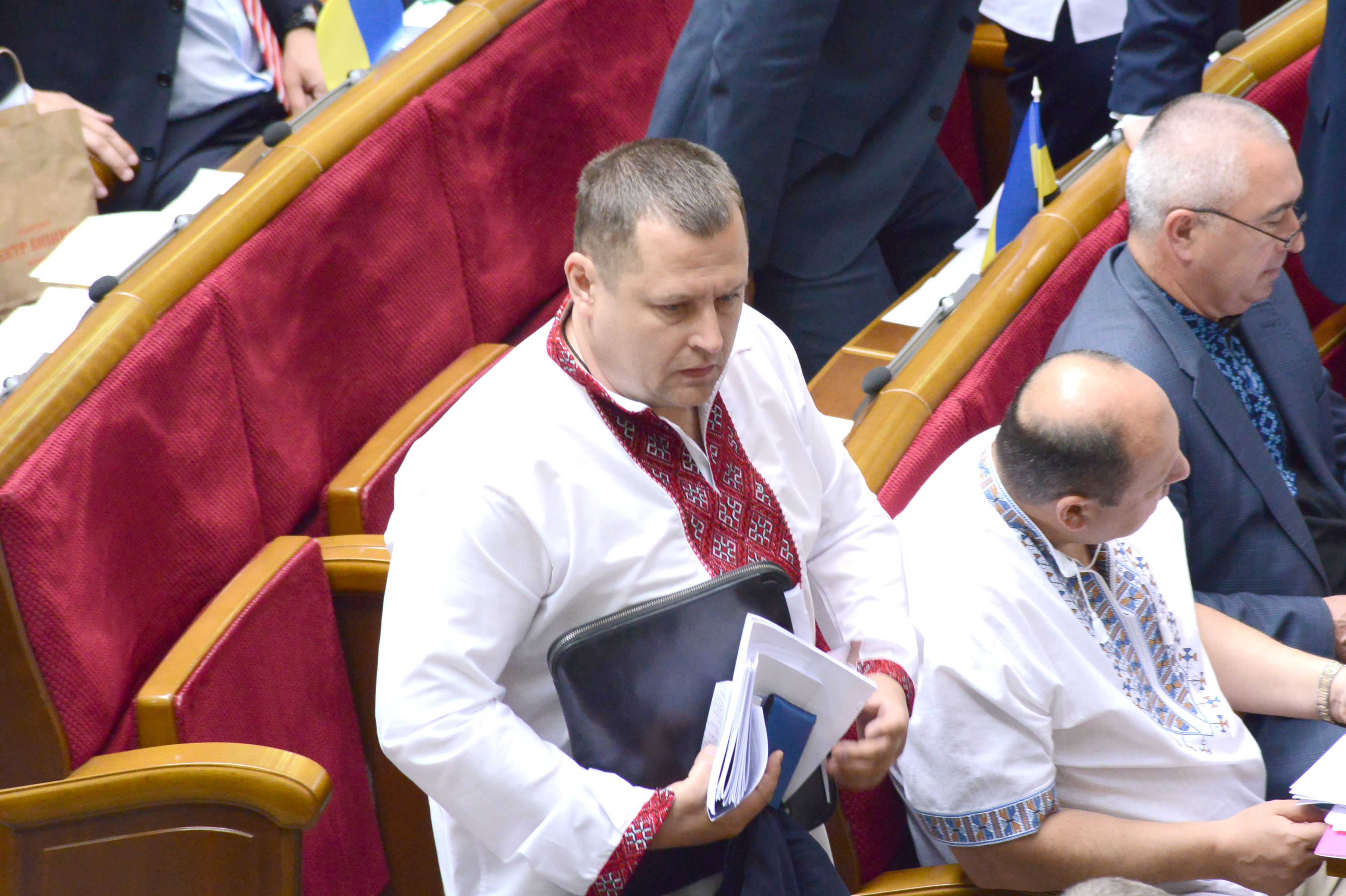 ВЕРХОВНА РАДА УКРАЇНИ 2015 фотограф Вадим Чуприна